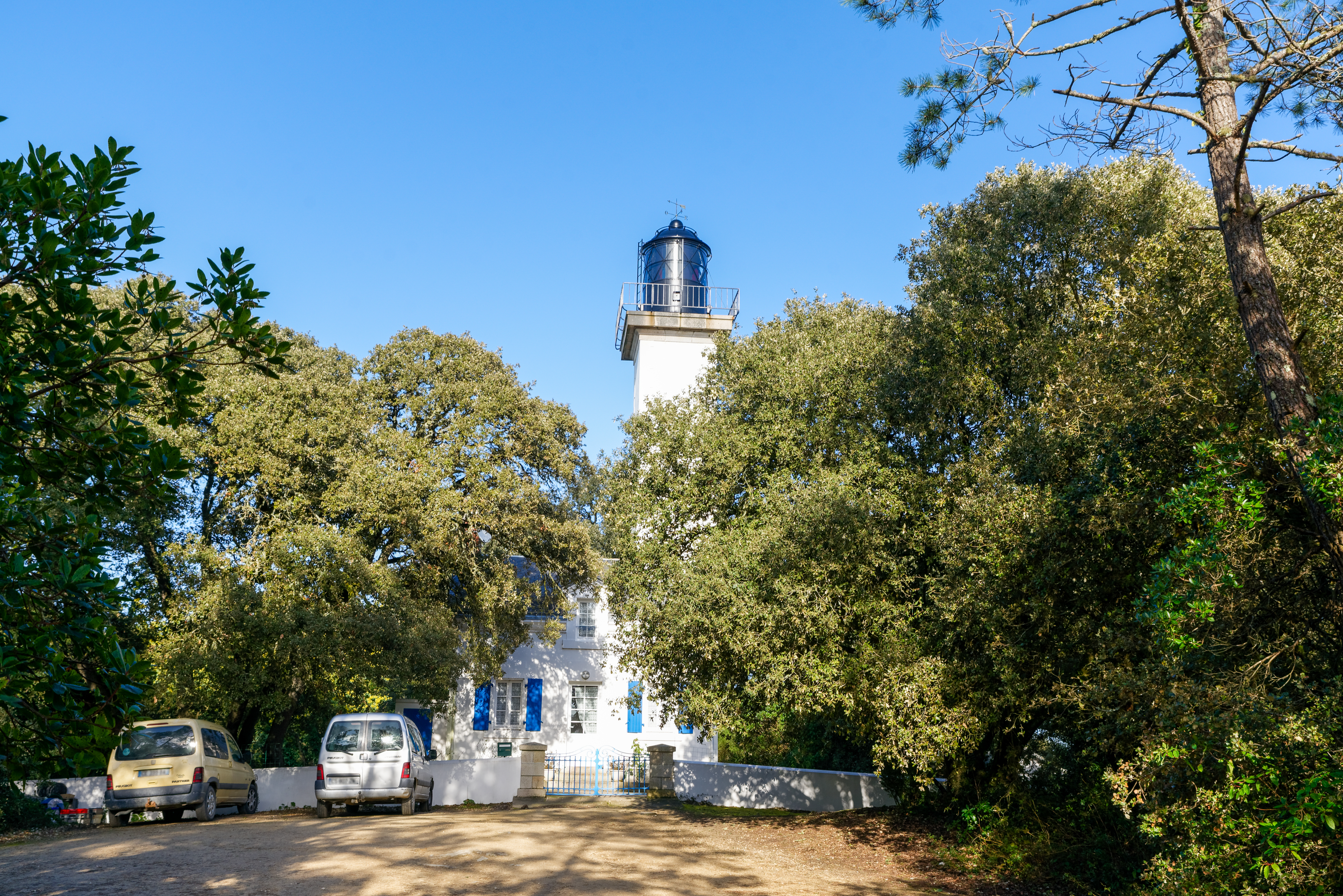 Phare de la Pointe des Dames, Noirmoutier-en-l'Île. (Île de Noirmoutier, Vendée, Pays de la Loire, France)